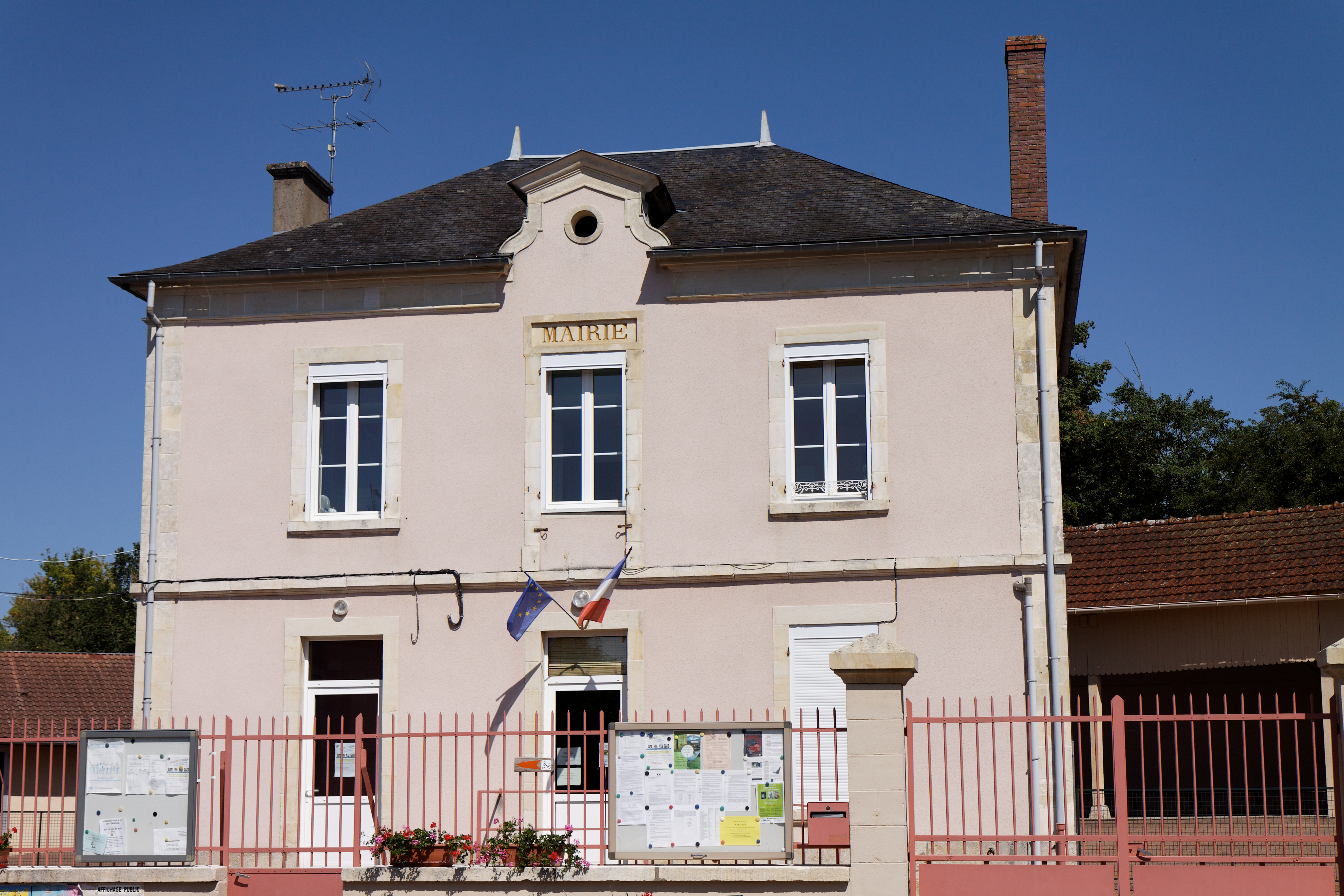 Mairie de la commune de Saint-Loup.